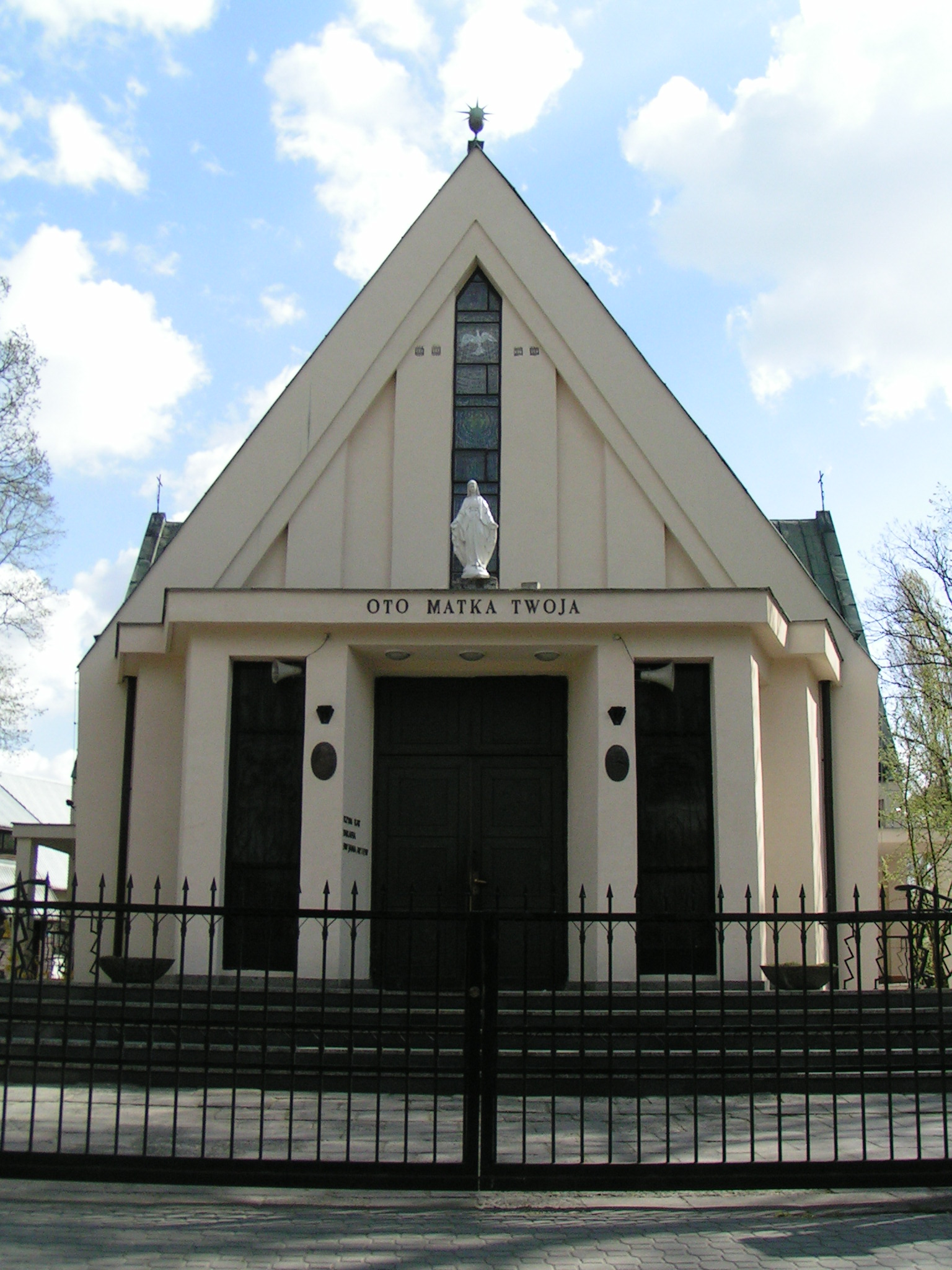 Kościół św. Jana Apostoła Ewangelisty. Kościuł znajdujący się w warszawskich Gołąbkach.